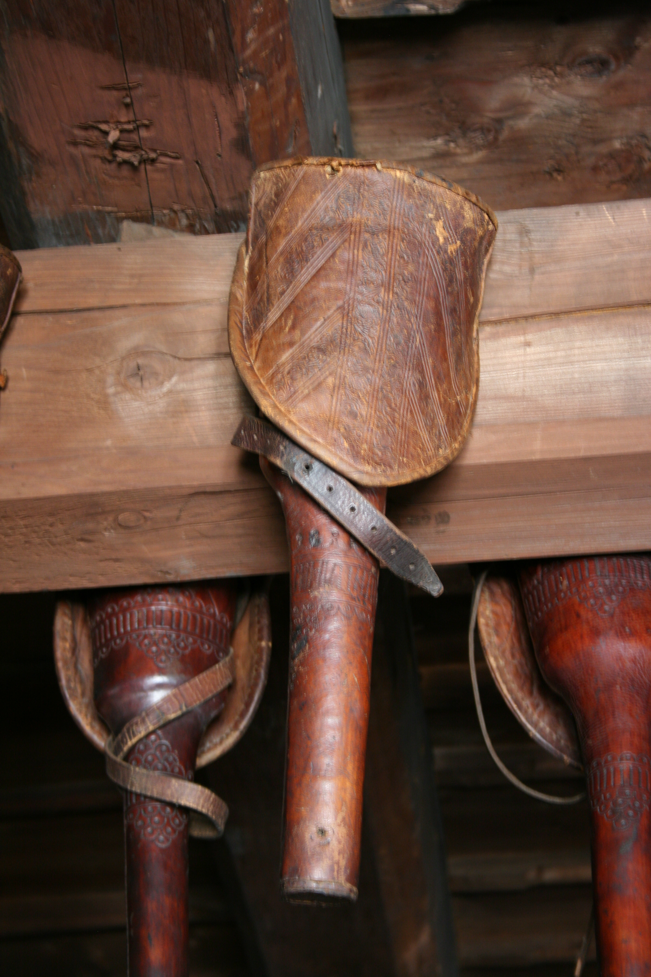 Hulfte/Holster für Radschlosspistolen im Landeszeughaus Graz.